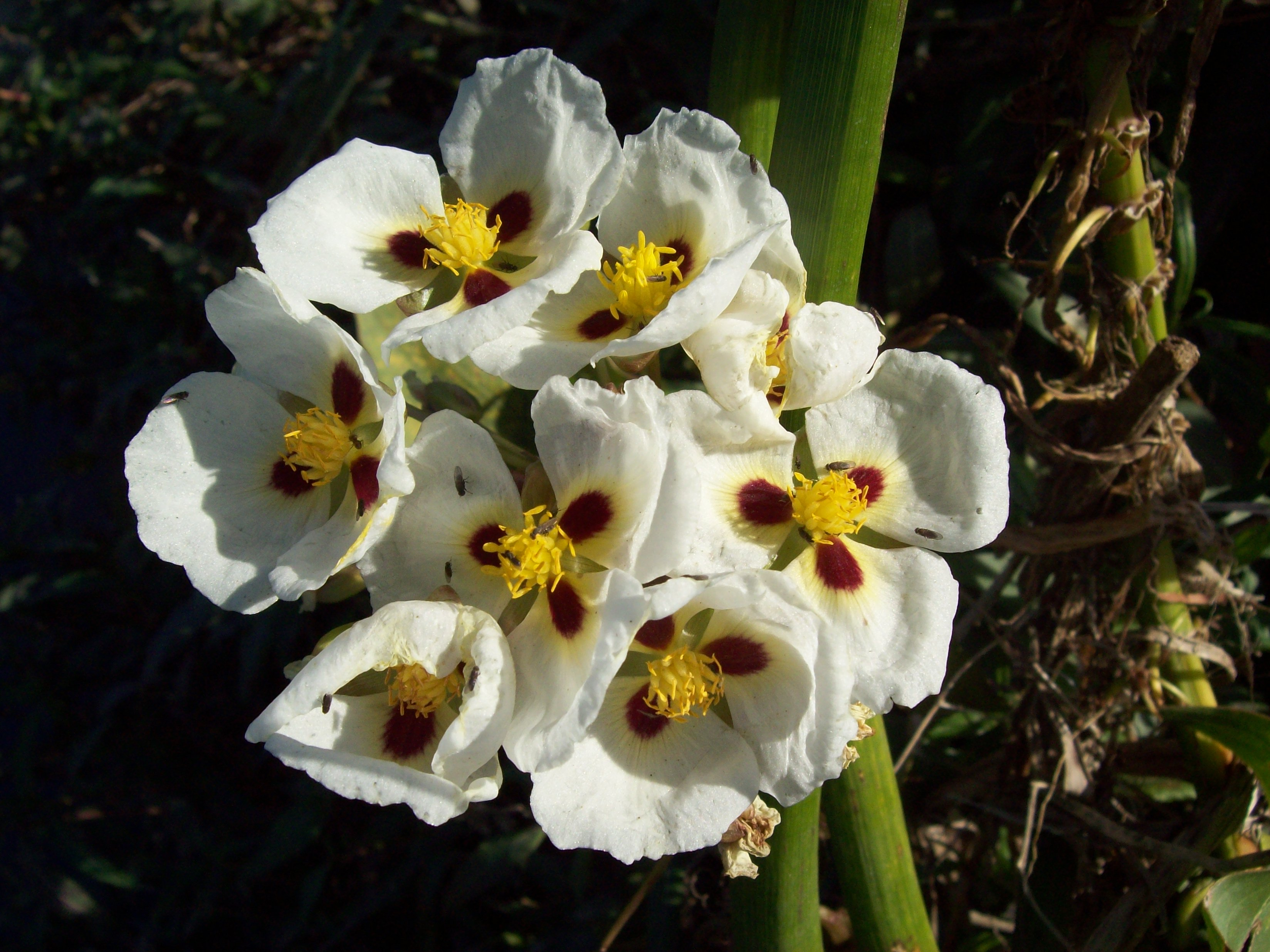 Flores de la saeta del Plata (Sagittaria montevidensis), en el arroyo Raggio, frontera entre la Ciudad Autónoma de Buenos Aires y la provincia de Buenos Aires, en el centro-este de la Argentina.